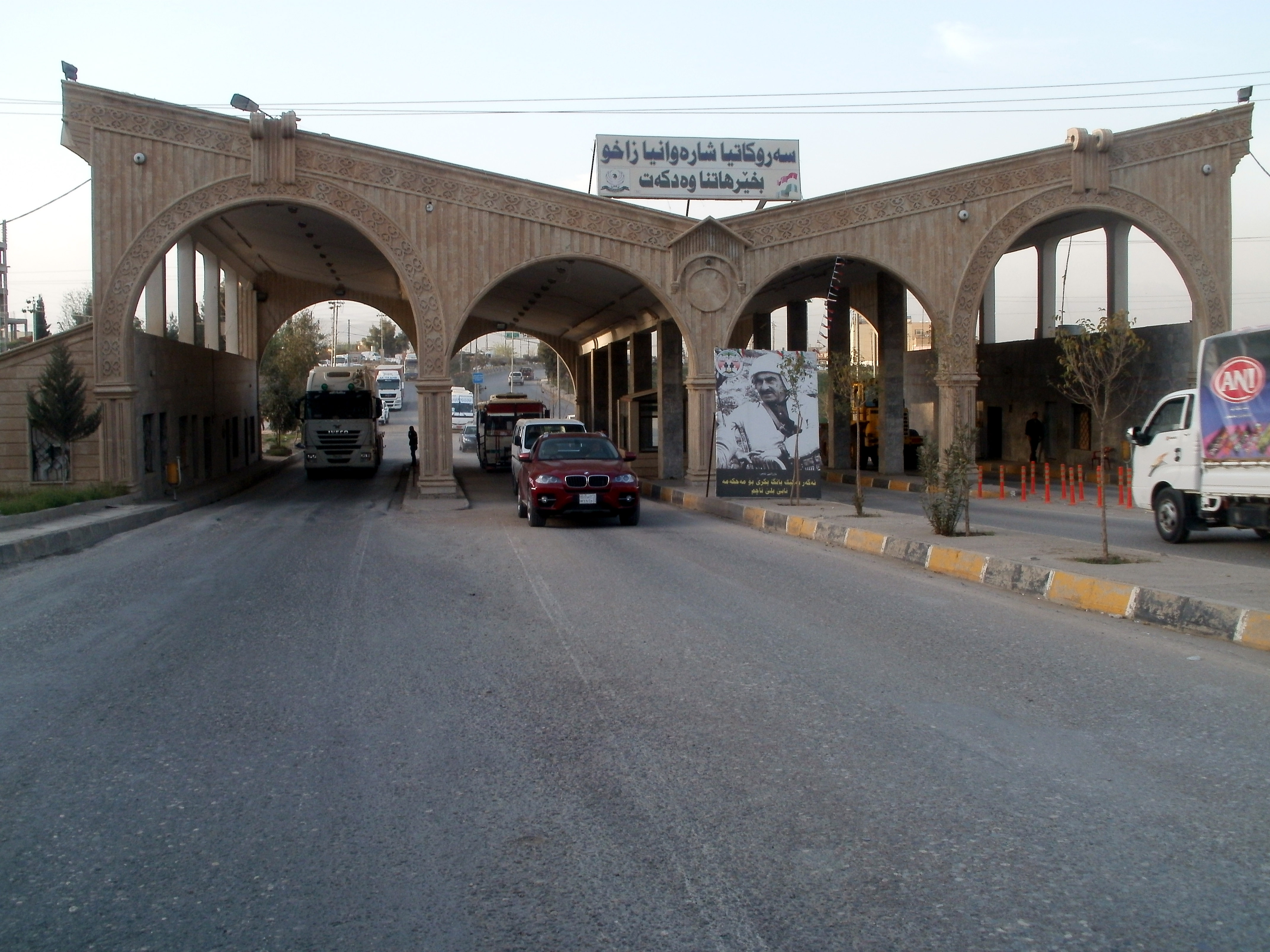 صورة لمدخل مدينة زاخو